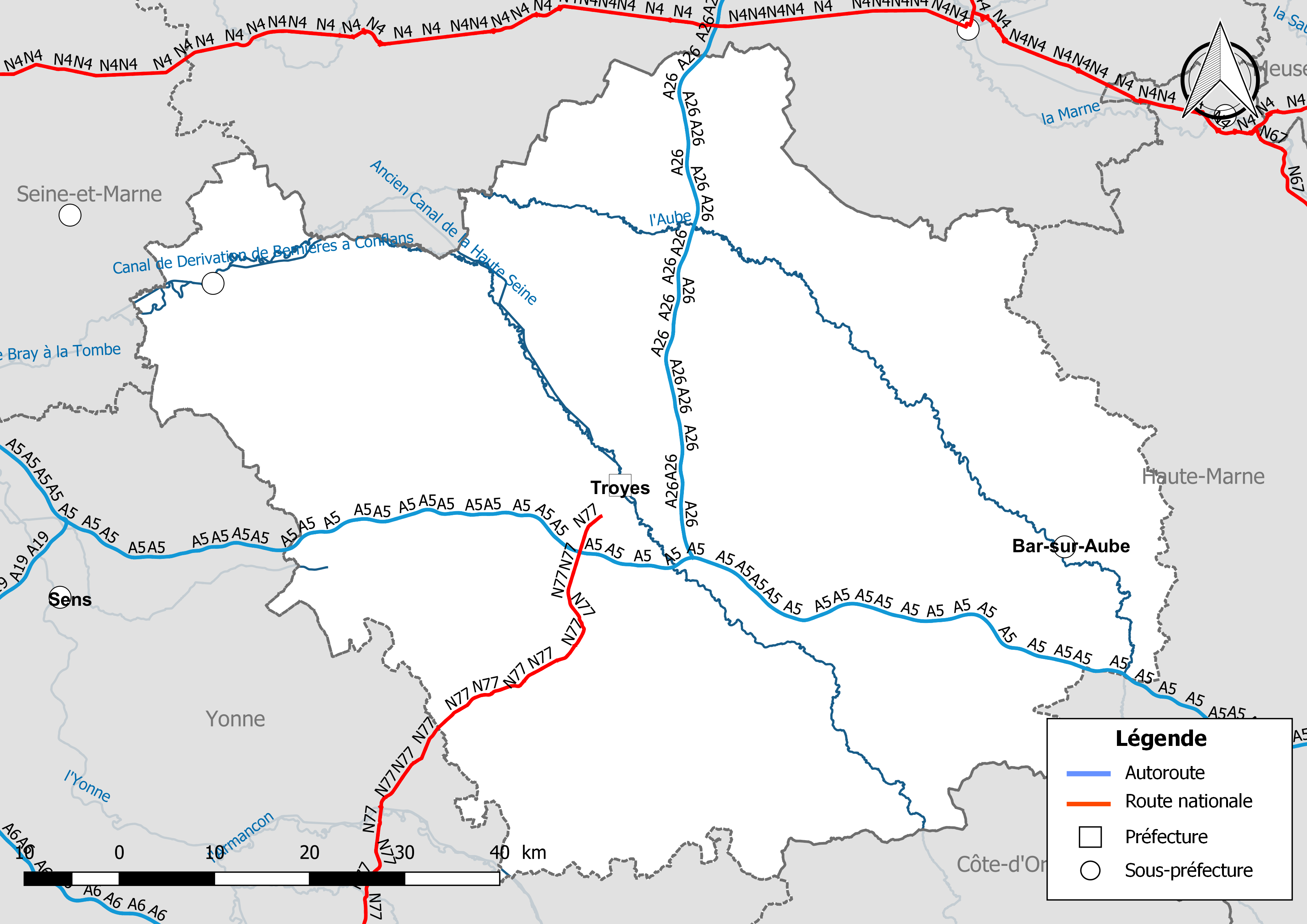 Carte du réseau routier national, constitué des autoroutes et des routes nationales, dans le département de l'Aube (France). Situation au 1er janvier 2019.